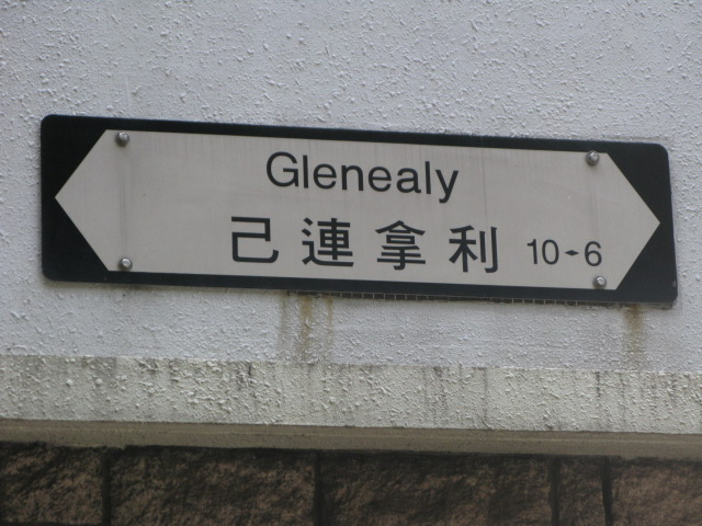 中文（香港）: 香港中環zh:己連拿利路牌